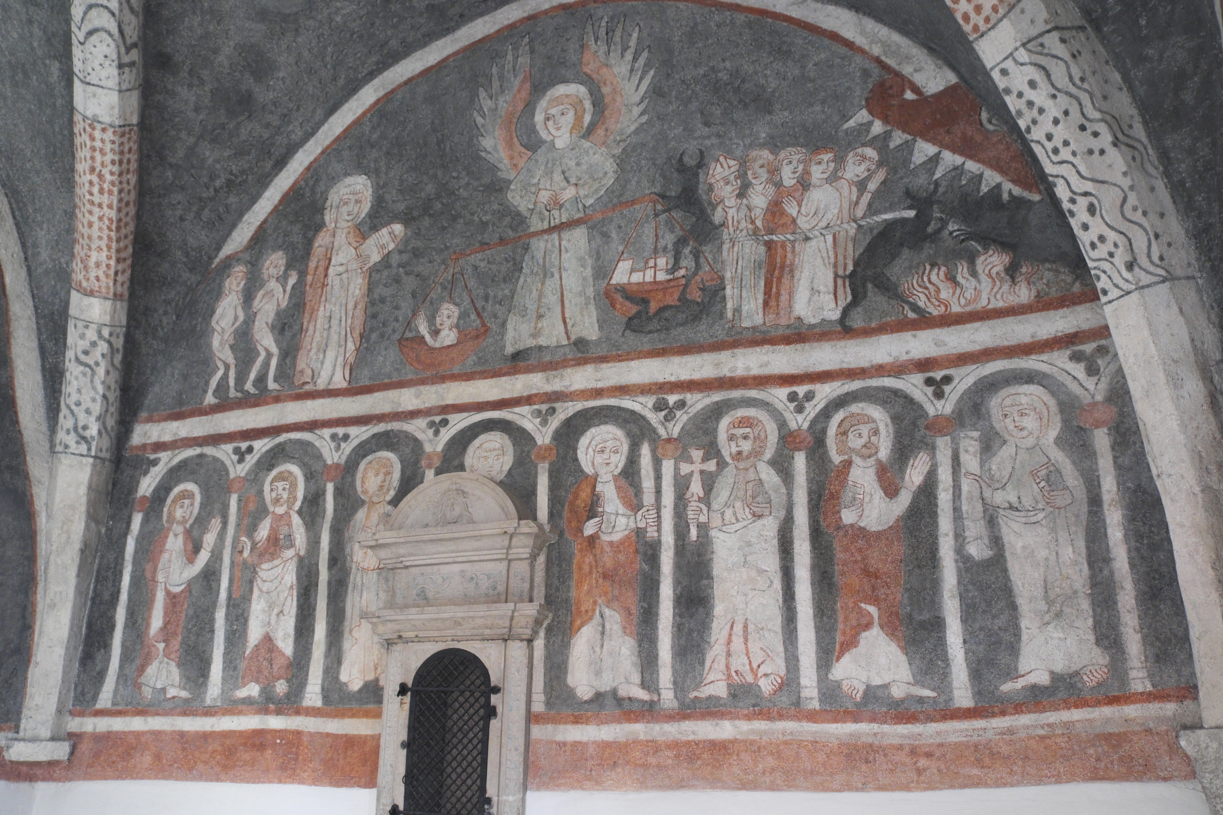 Katholische Pfarrkirche St. Vitus in Kottingwörth (Beilngries) im oberbayerischen Landkreis Eichstätt (Bayern/Deutschland), Wand- und Deckenmalereien in der Vituskapelle, in Fresko- und Seccotechnik, wohl nach 1313 entstanden